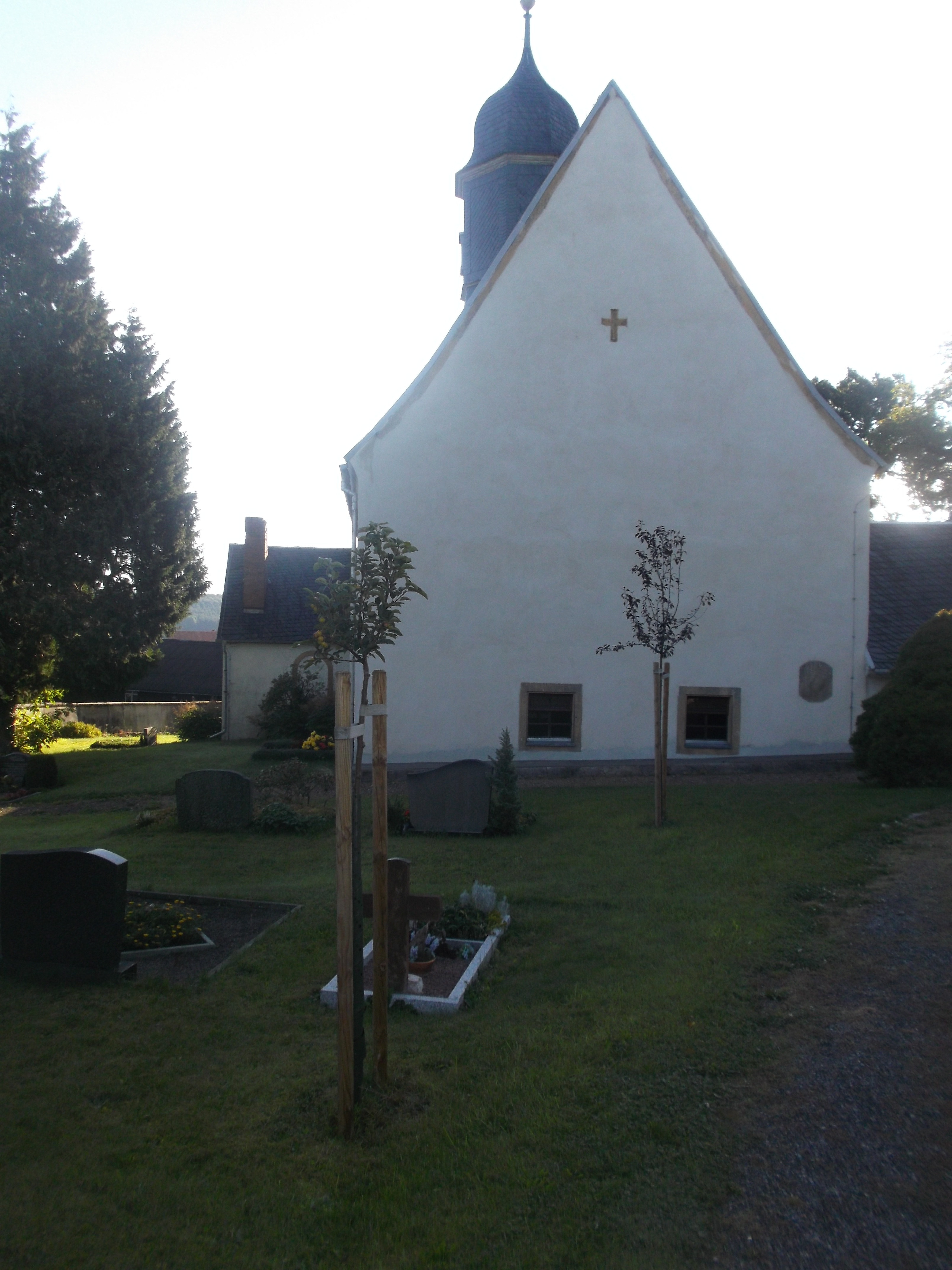 Ansicht der Kirche Seifersdorf bei Dippoldiswalde